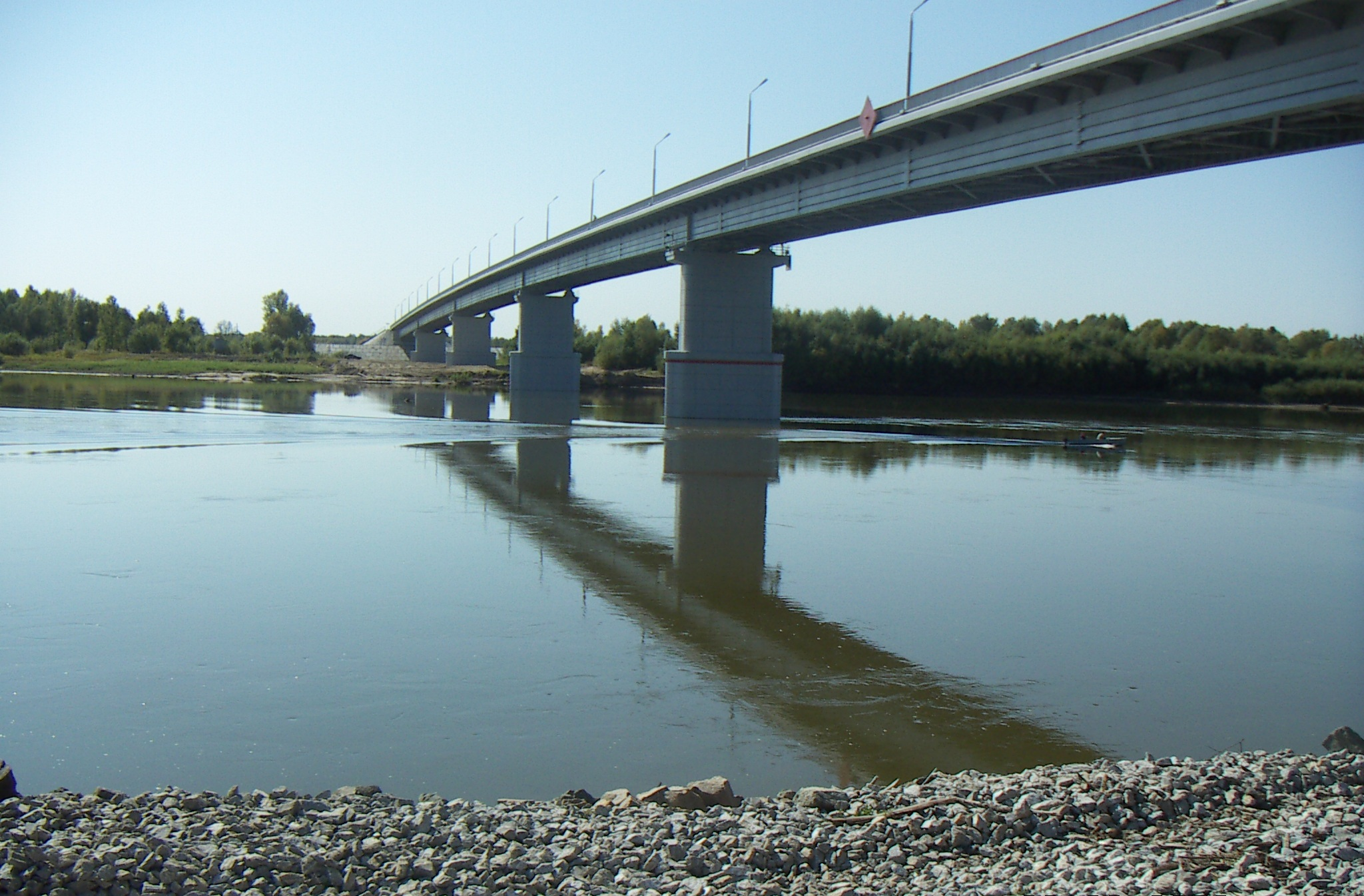 Мостовой переход через реку Чулым Томская область